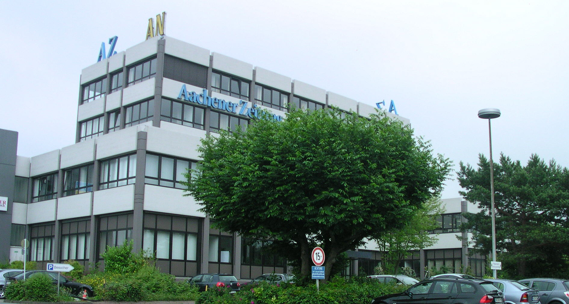 Aachen, Zeitungsverlag für AN und AZ, Super Sonntag und Super Mittwoch usw.